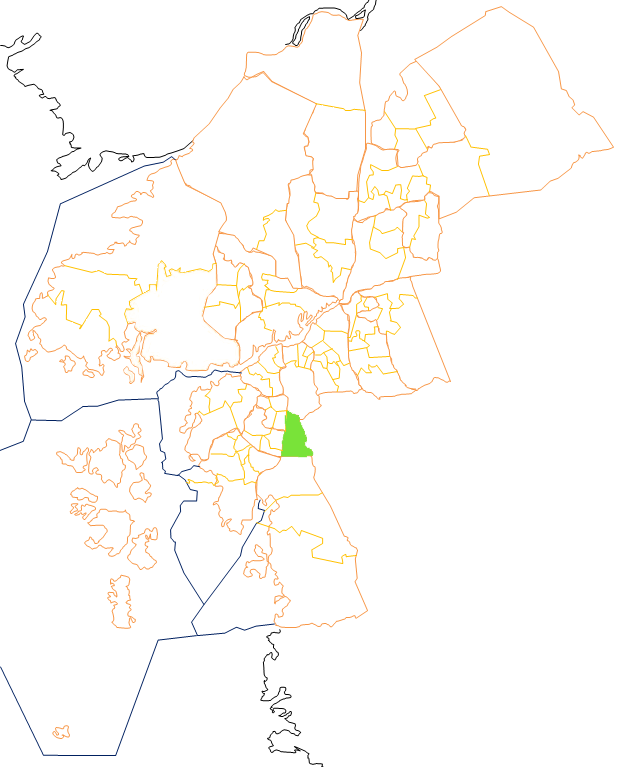 Karta som visar primärområdes belägenhet i Göteborg